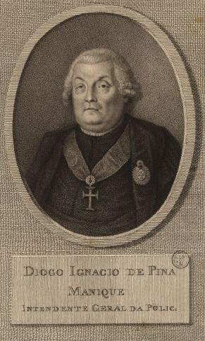 Diogo Inácio de Pina Manique (1733-1805), Intendente Geral de Polícia. Gravura a água-forte conservada na Biblioteca Nacional de Lisboa, obra de